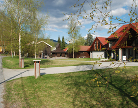 Gulden kunstverk: Galleriet og Låven.